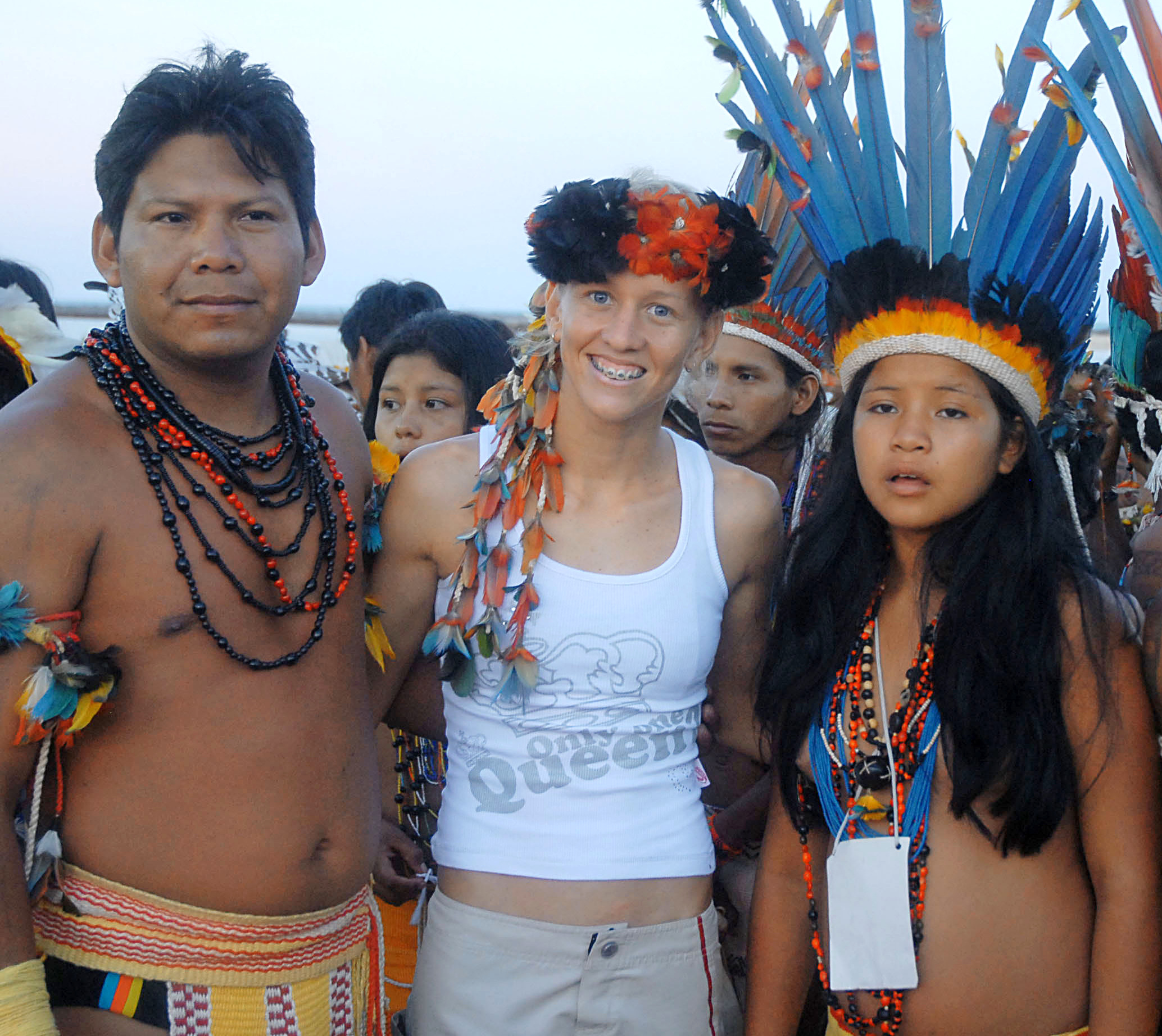 Atleta pernambucana medalha de ouro no pentatlo nos Jogos Pan-Americanos do Rio de Janeiro, Yane Marques, posa ao lado de índios, na nona edição dos Jogos dos Povos Indígenas (Olinda PE)